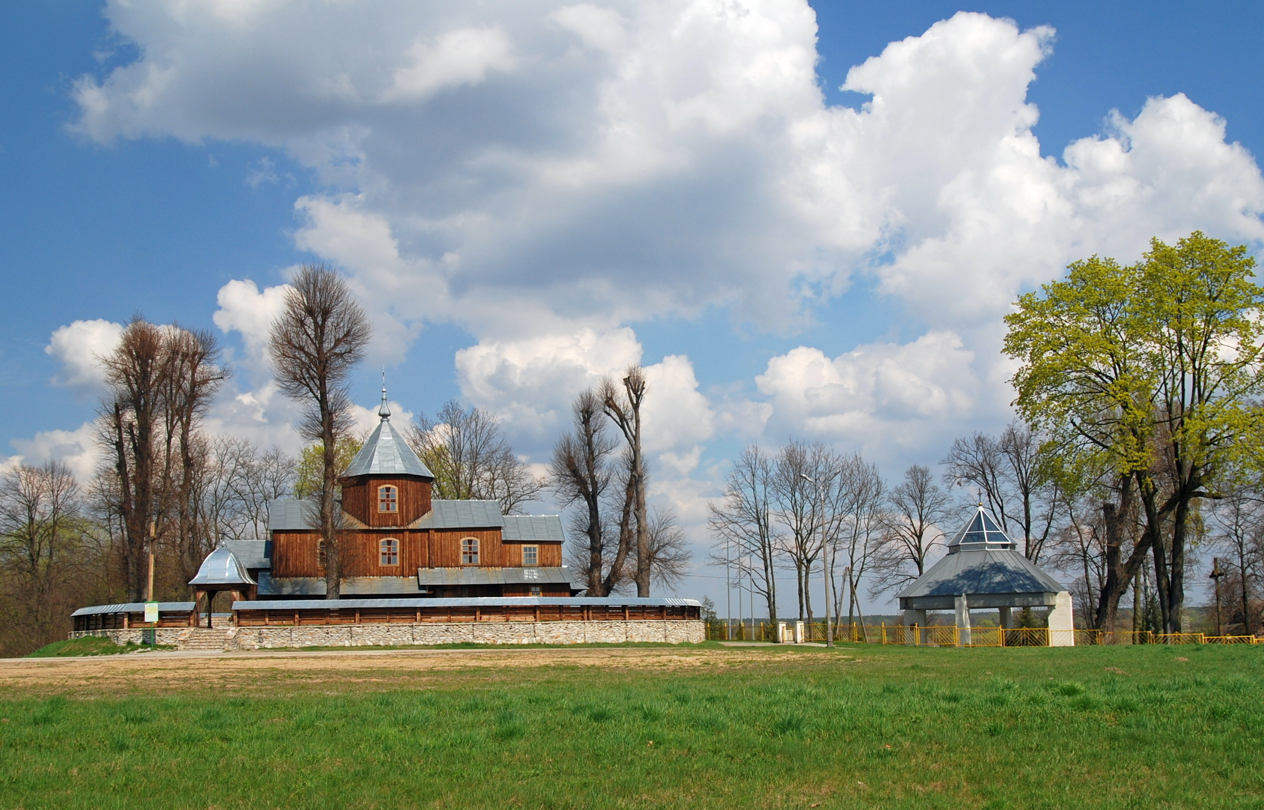 wieś Młyny